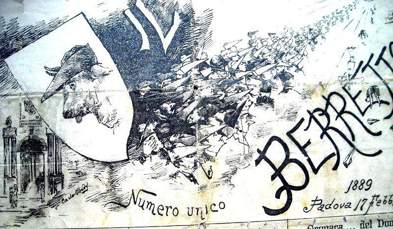 Détail de la première page du journal à numéro unique de la Goliardia de Padoue "Il Berretto : Le Béret, 17 février 1889.